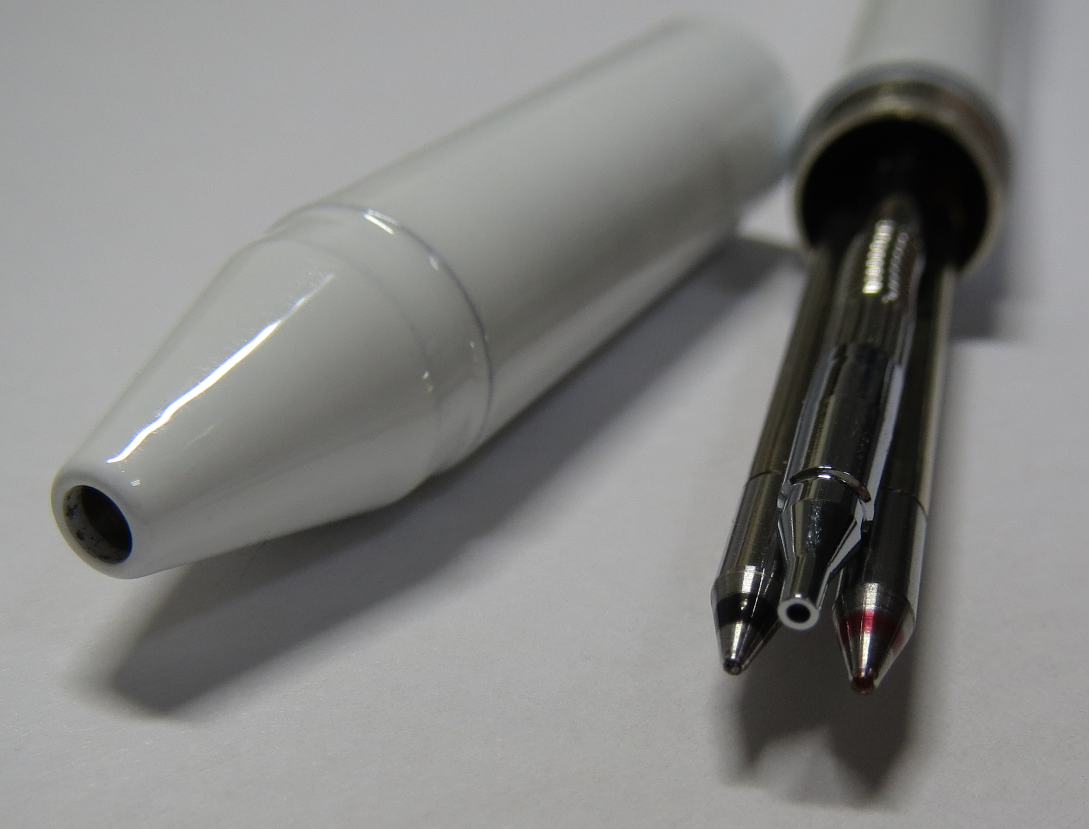 この多機能ペンには黒、赤のボールペンと、芯口径0.5mmのシャープペンシルの3種類のペンが内蔵されている。